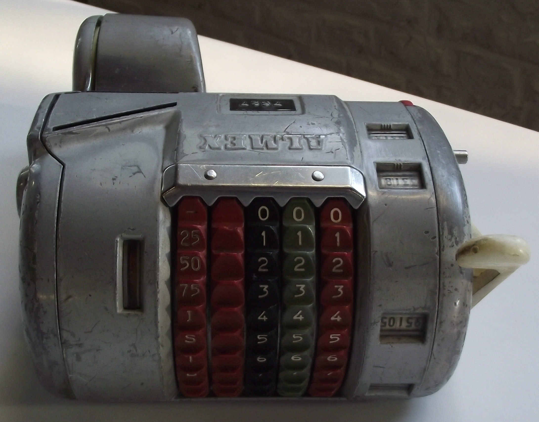 De veel gebruikte biljetverdeler door de ontvangers bij de buurtspoorwegen